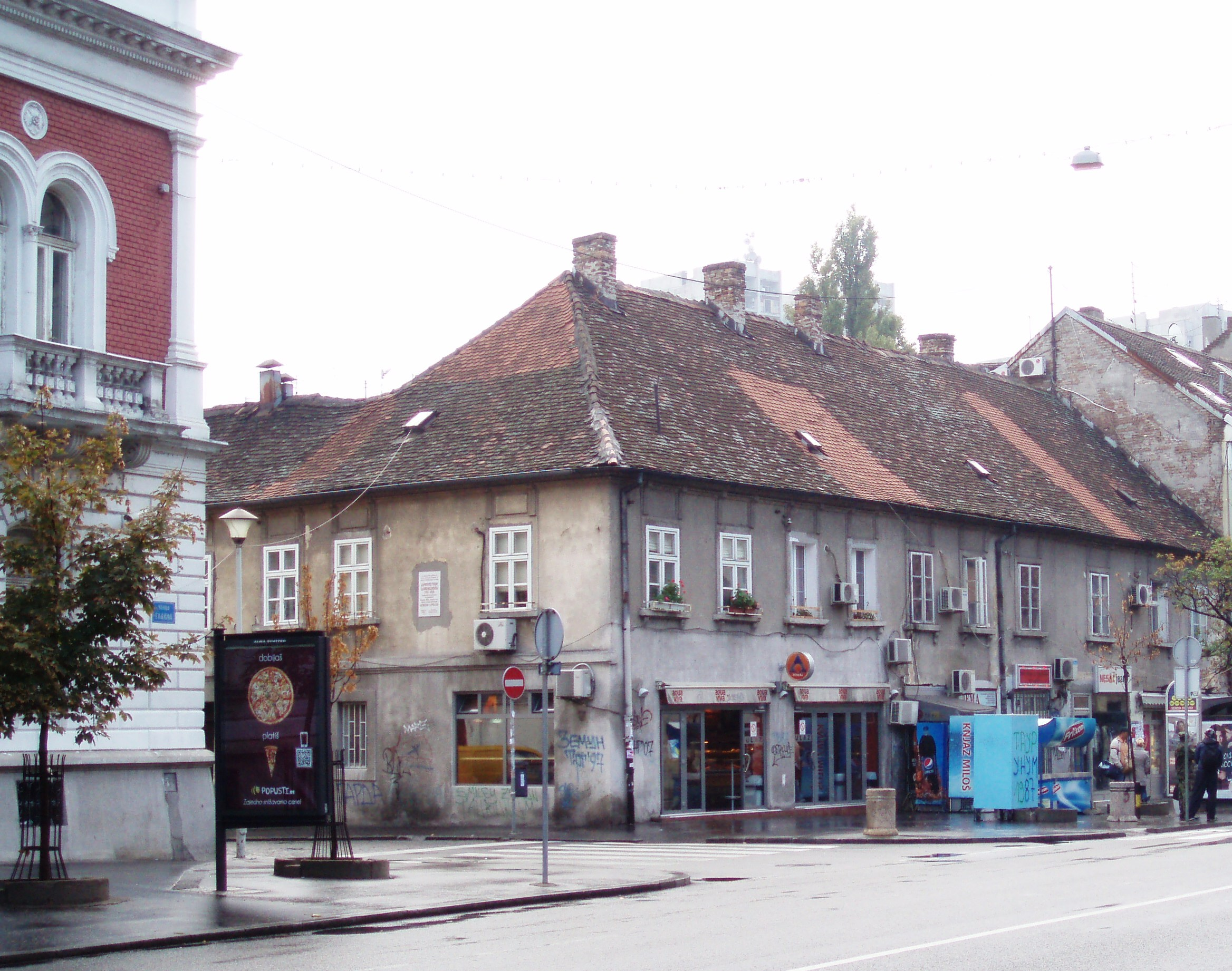 Kuća Dimitrija Davidovića Zemun, Glavna 6, sagrađena krajem 18. veka, Autor Nicolo